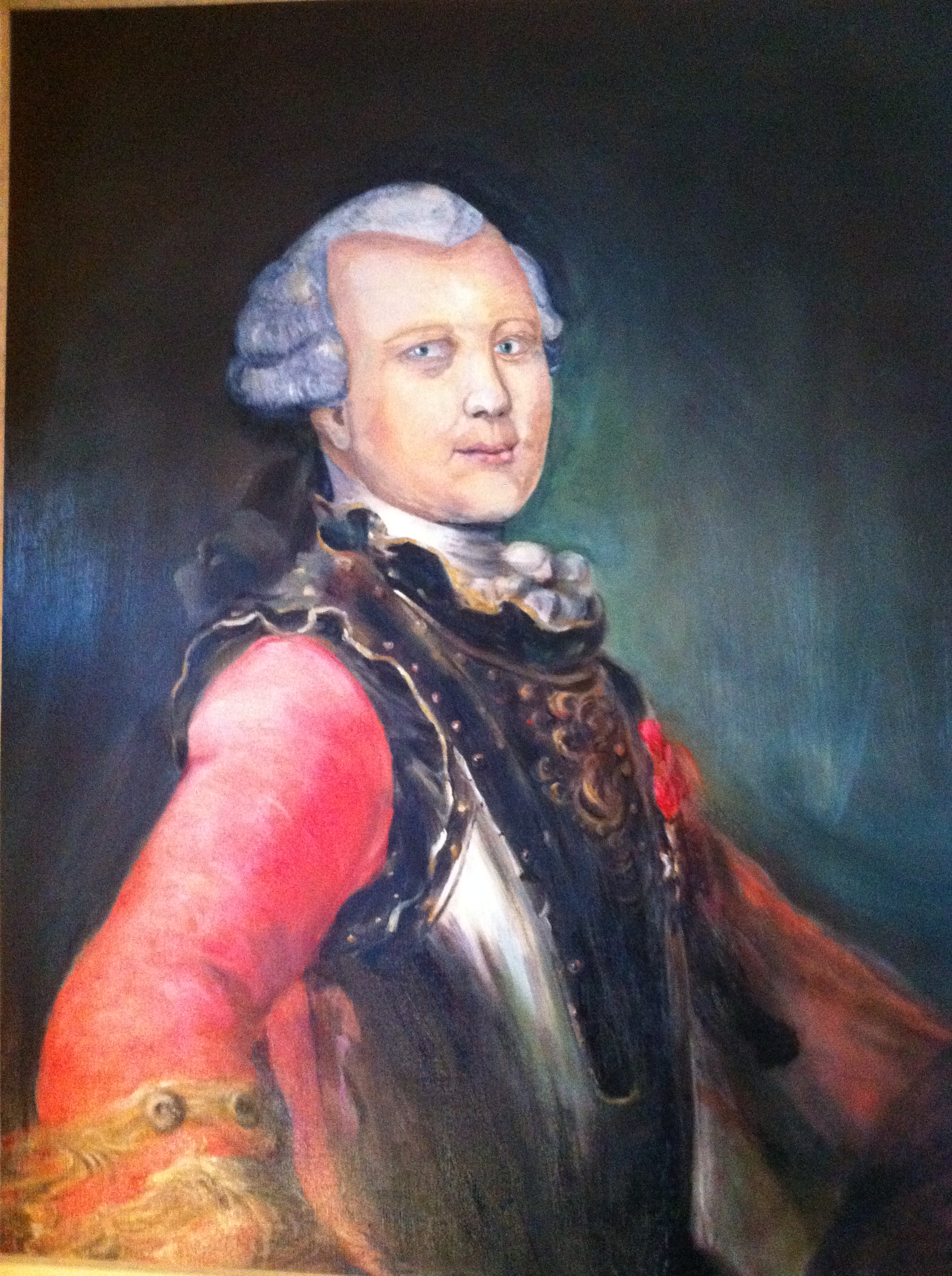 Copie du XXI- siècle du portrait original du XVIIIè siècle